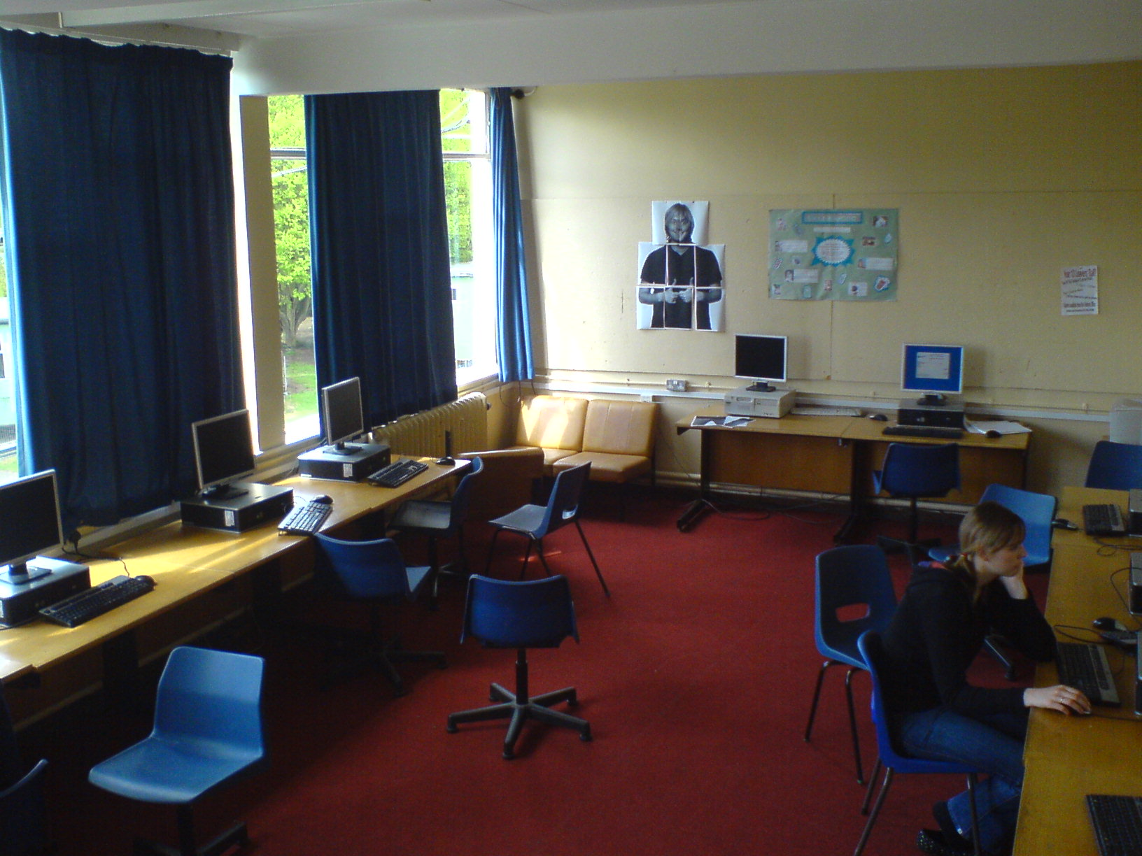 computina en la sala de computación